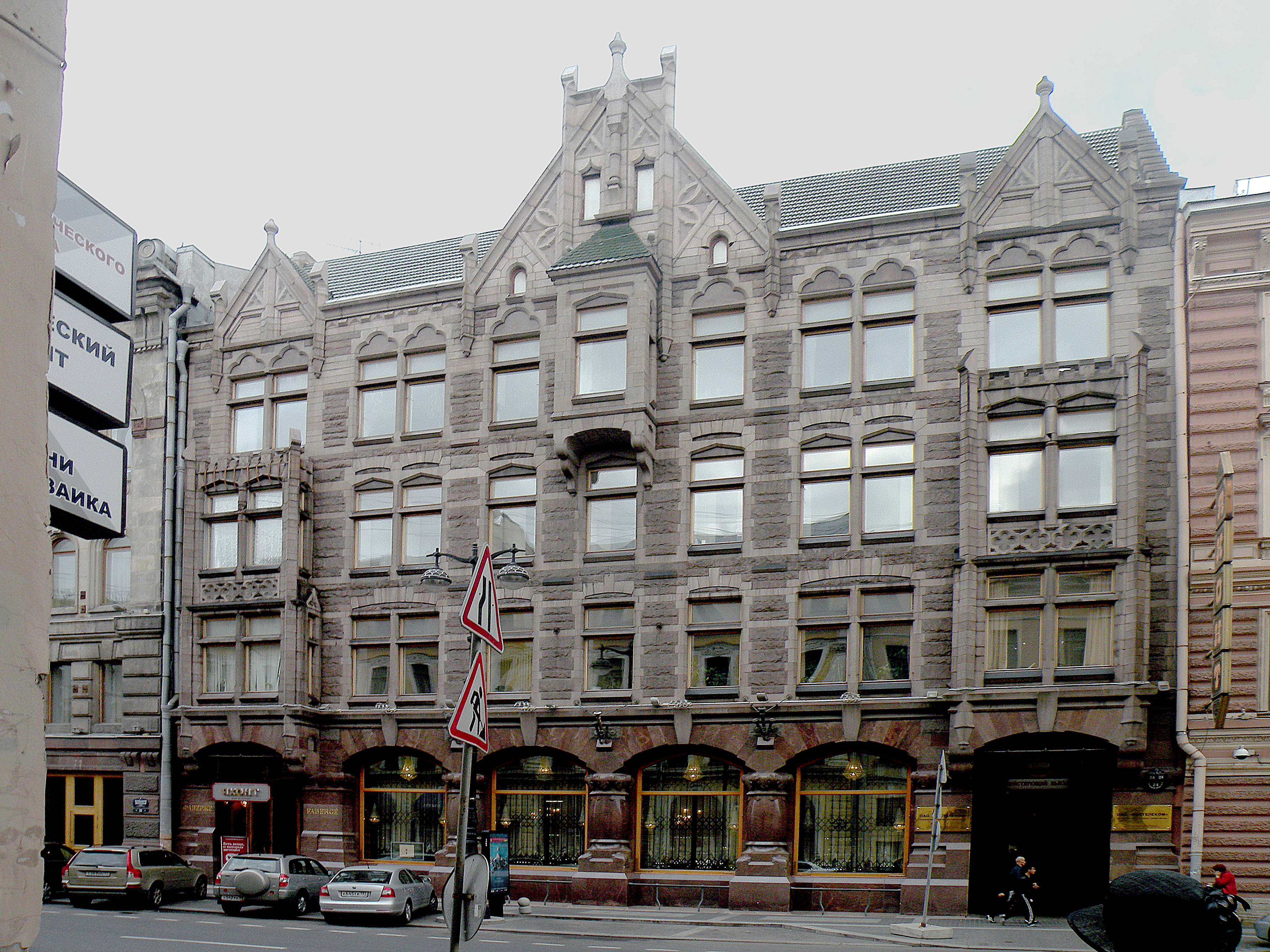 Шмидт Карл Карлович (1866 - 1945) Б.Морская 24 Здание фирмы К.Г.Фаберже